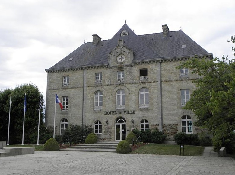 Mairie de Montauban-de-Bretagne (35).